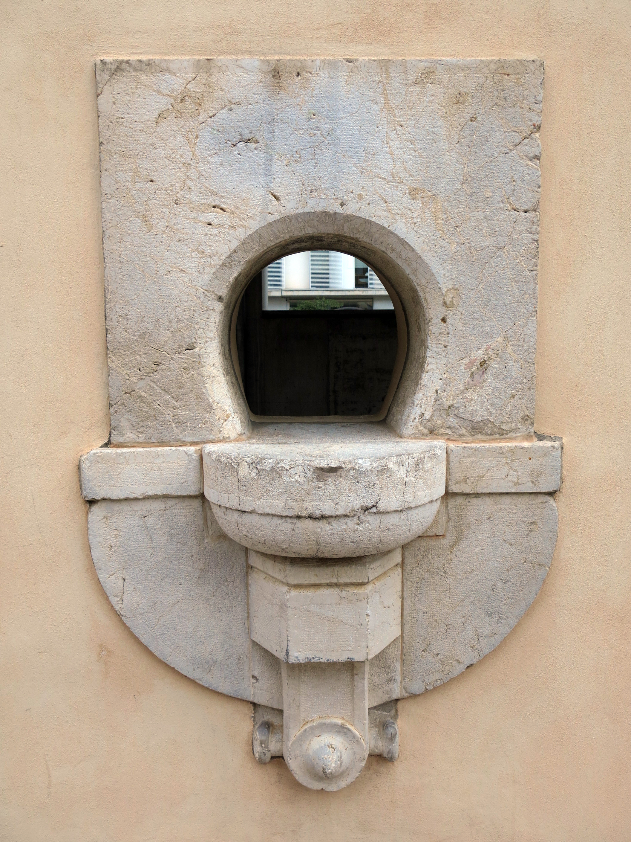 Teatre Apol·lo (Vilanova i la Geltrú)